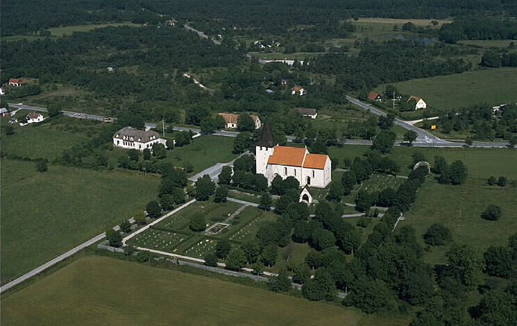 Motiv: Bunge kyrka Nyckelord: Flygbilder, Riksintressen Kategori: Kyrkomiljö Bunge kyrka. Länsväg 148 går förbi norr om kyrkan.